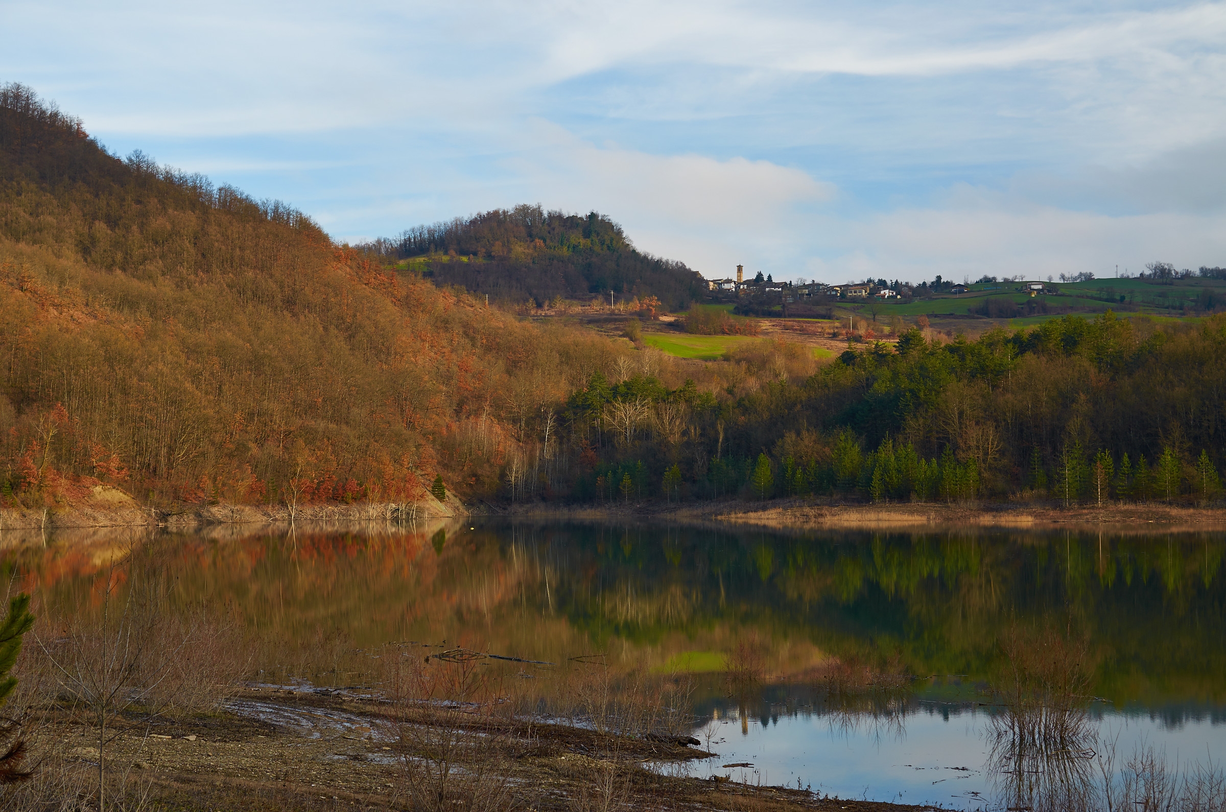 Vista verso Trebecco